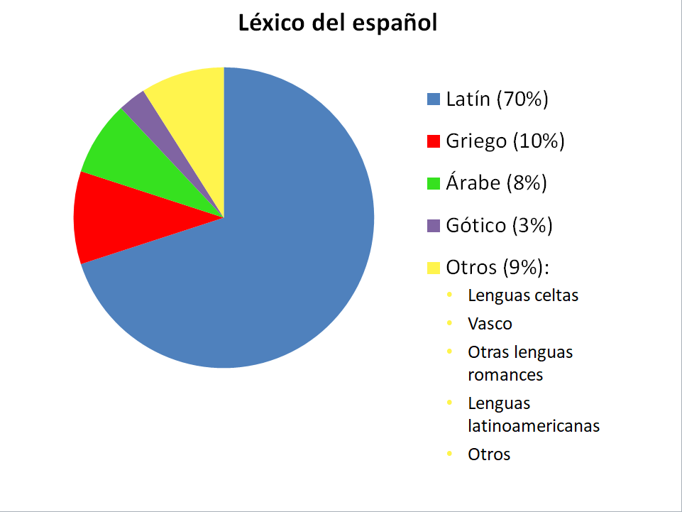 Este gráfico demuestra el porcentaje de los idiomas de cuales proviene el léxico español.